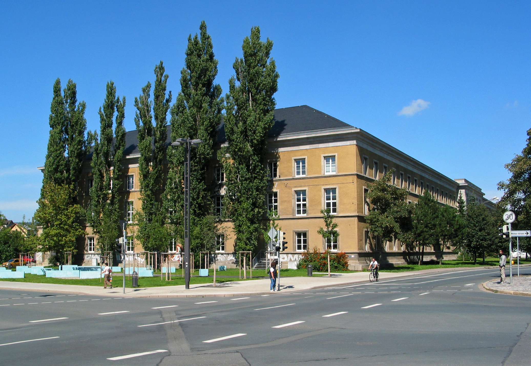 Südansicht des ehemaligen Westflügels vom Gauforum Weimar, heute wird das Gebäude vom Thüringischen Landesverwaltungsamt genutzt